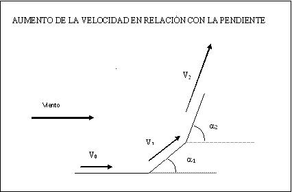 Velocidad de propagación del fuego en relación con la pendiente